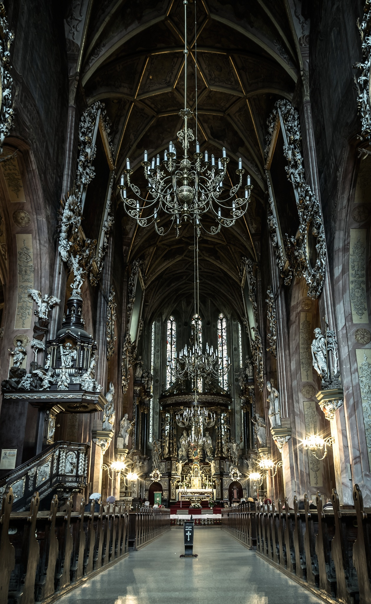 Świdnica, pl. Jana Pawła II - kościół farny, nast. Jezuitów, ob. kościół katedralny, parafialny p.w. św. Stanisława i Wacława (zabytek nr rejestr. A/1676/77 29.03.1949)